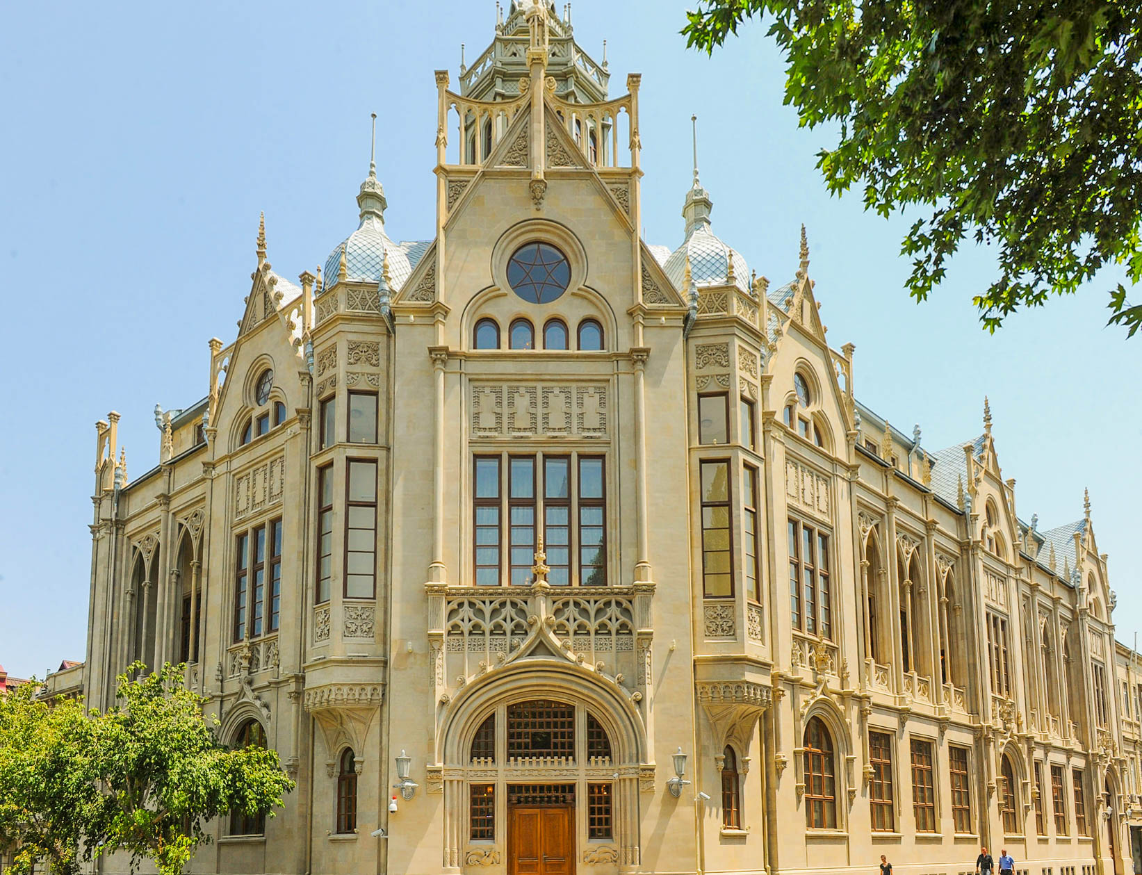 Palace of Happines